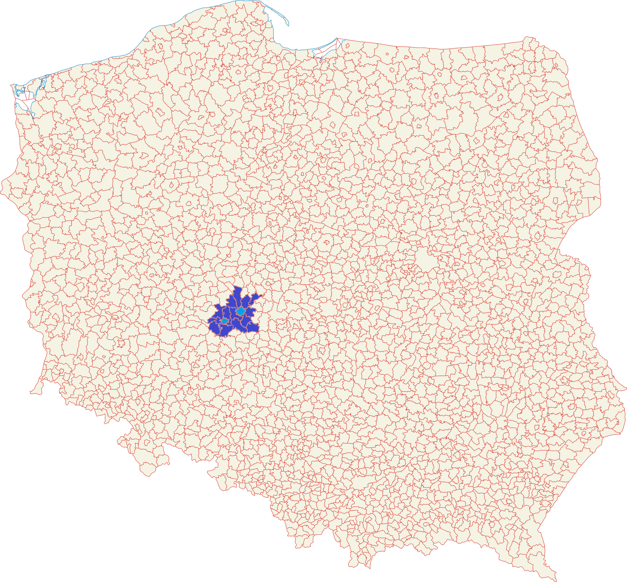 Gminy aglomeracji kalisko-ostrowskiej wg koncepcji Wielkopolskiego Biura Planowania Przestrzennego w Poznaniu z 2010 r. na mapie administracyjnej Polski (granice gmin wg stanu na 1 stycznia 2008)